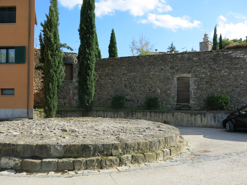 restes de una torre del castell de Besalú a la Comarca de la Garrotxa - Catalunya